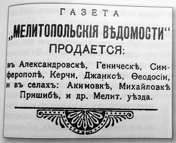 Из сайта vmelitopole.ru